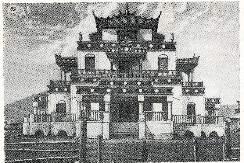 Гравюра Анинского дацана